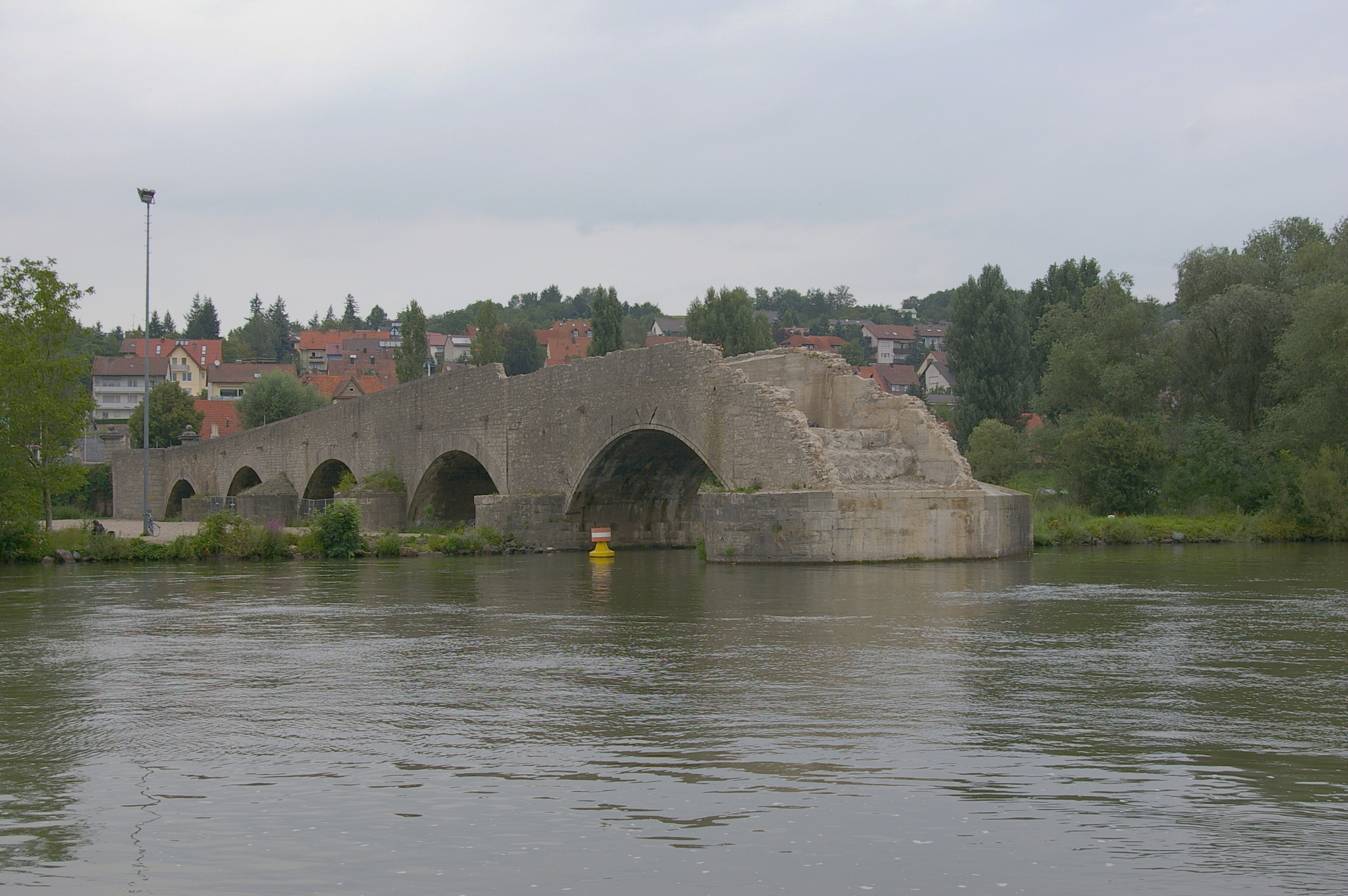 Alte Mainbrücke in Ochsenfurt